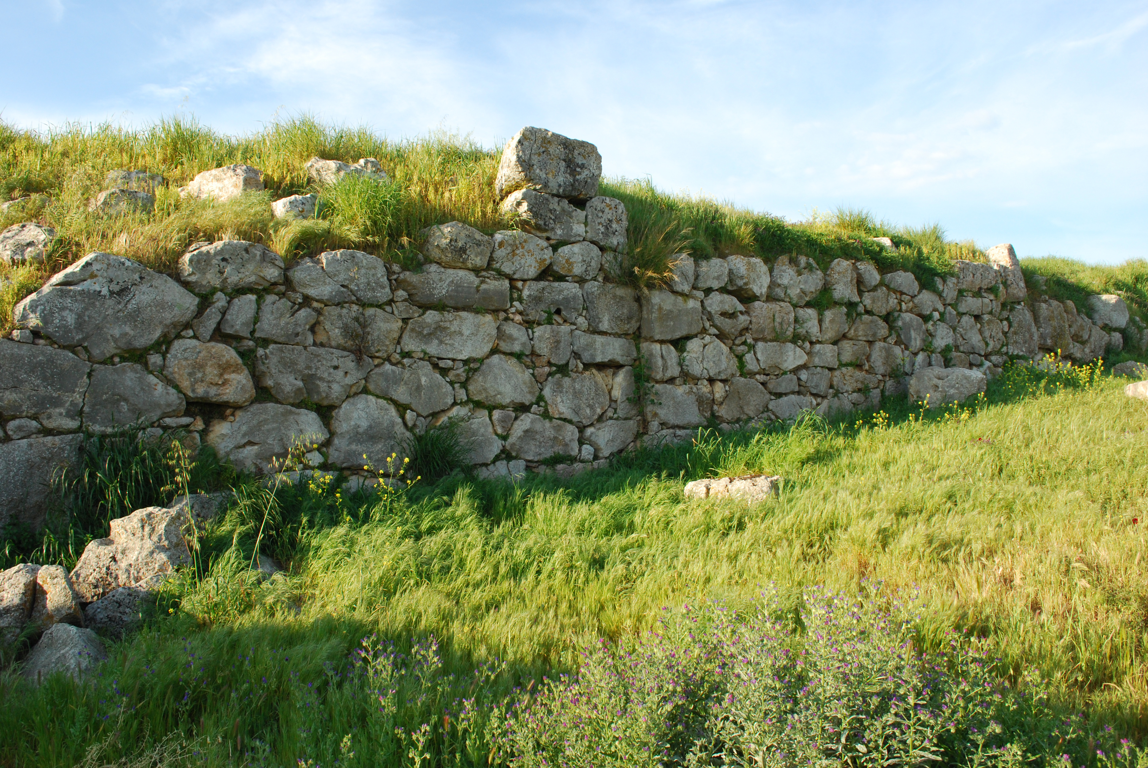 Vue de la forteresse de Tirynthe.